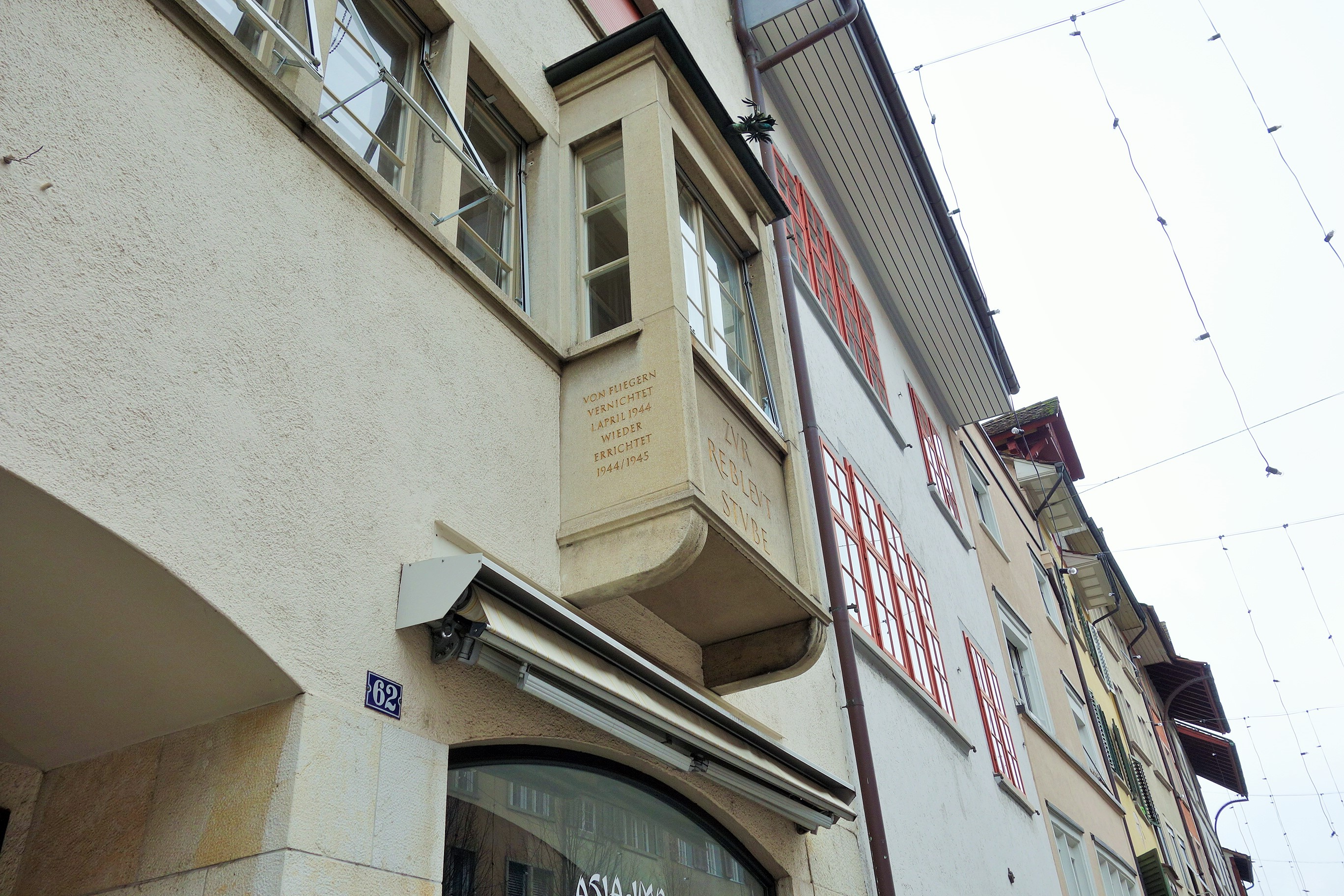 Bombardierung von Schaffhausen, Schweiz, 1. April 1944; Zun Rebleuten Stube, Neustadt 62. Inschrift auf dem Erker: «Von Fliegern vernichtet 1. April 1944, wieder errichtet 1944/1945»